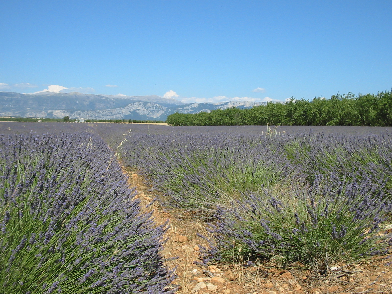 Champ de lavande sur le plateau de Valensole.